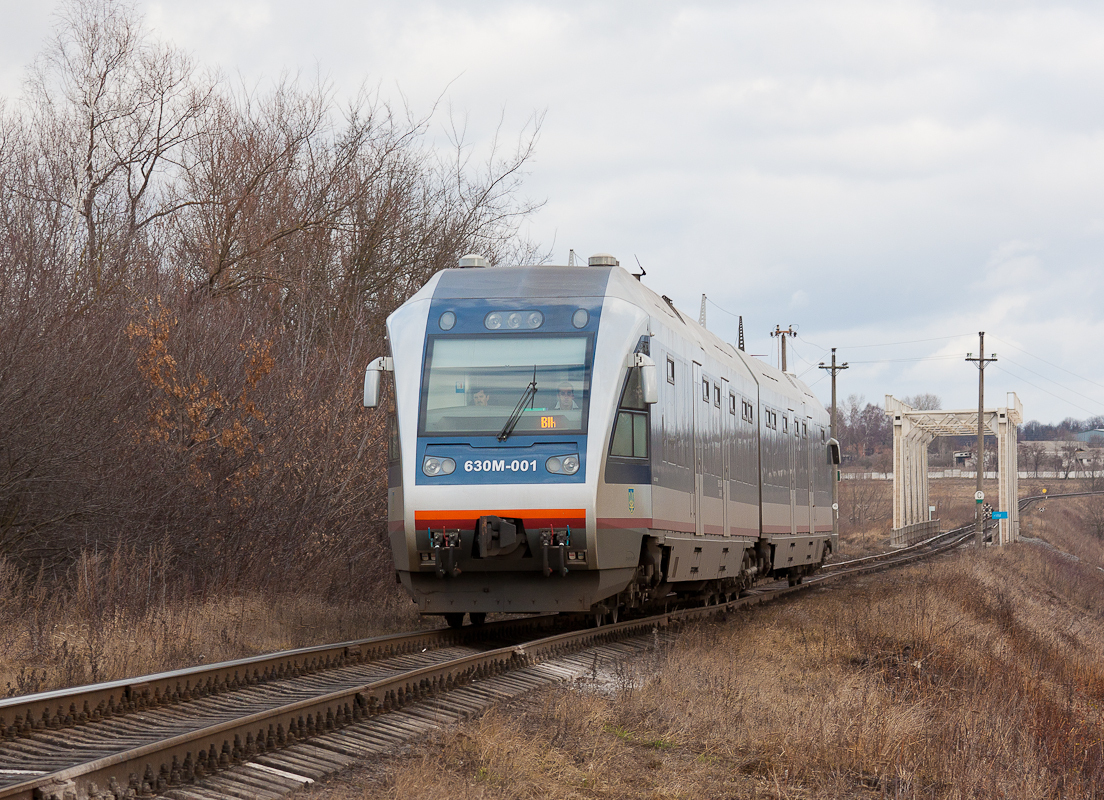 Залізничний міст через Південний Буг поблизу Хмельницького